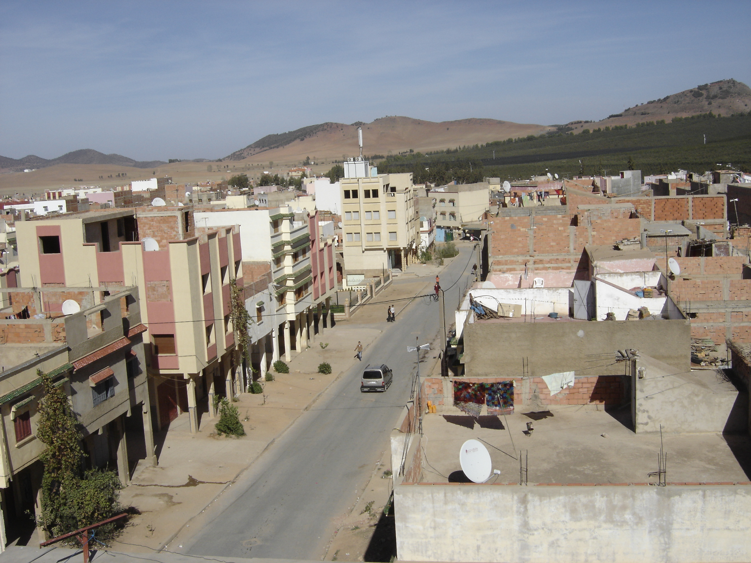 Vue d'Oulmés (Maroc)